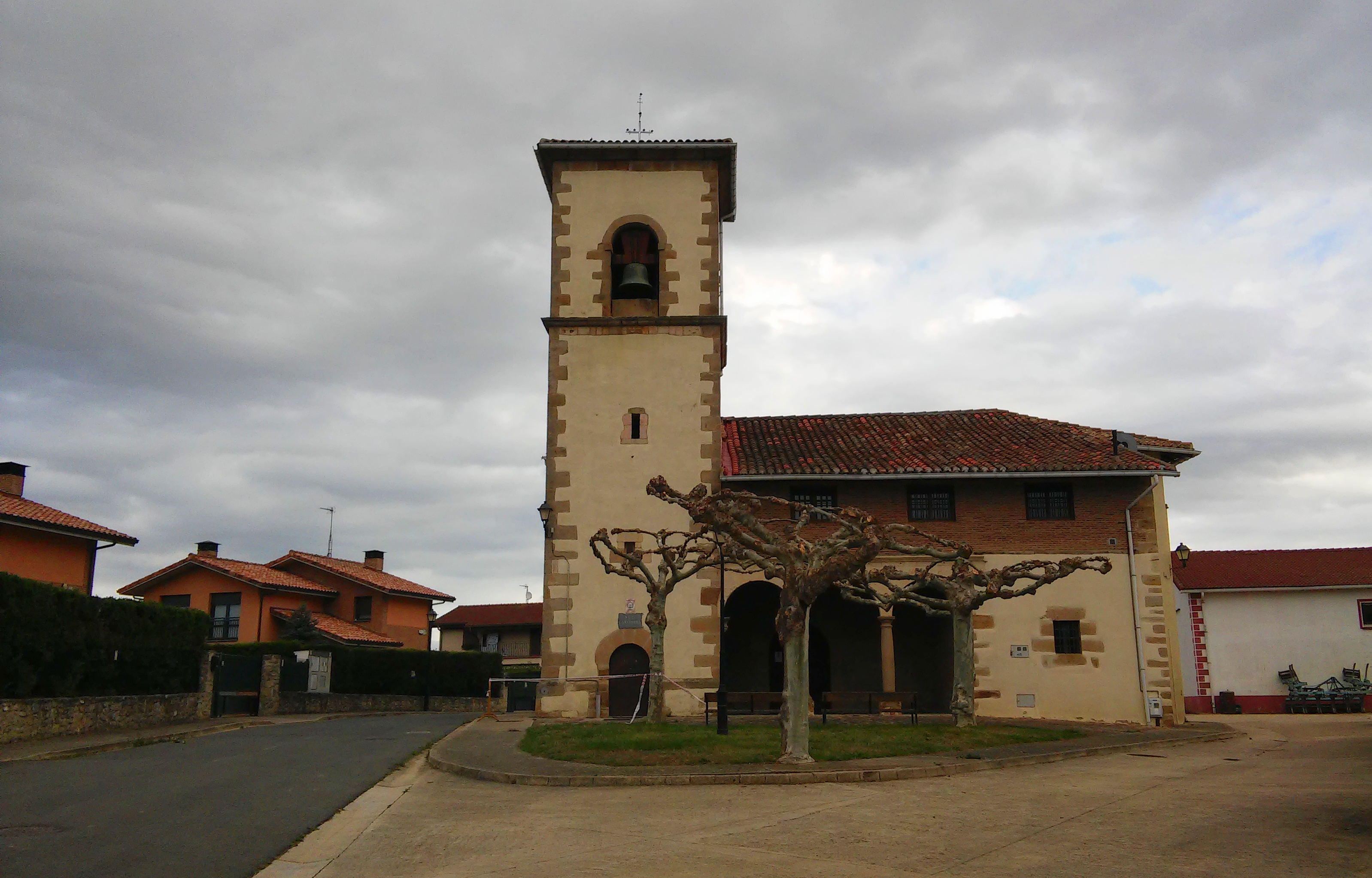 Erretana herriko eliza (Gasteiz)